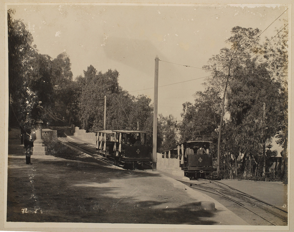 Vista del ferrocarril de cremallera del cerro Santa Lucía, en Santiago de Chile (c. 1908). Se observan los 2 carros que poseía y el cruce de vías en donde se realizaba la inversión del sentido de marcha para continuar hacia arriba o abajo por el cerro.